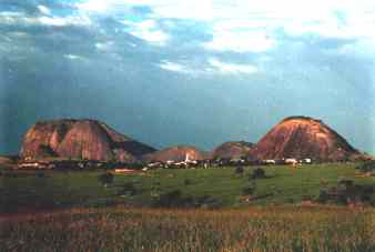 Picture from Lajedao / Brasil